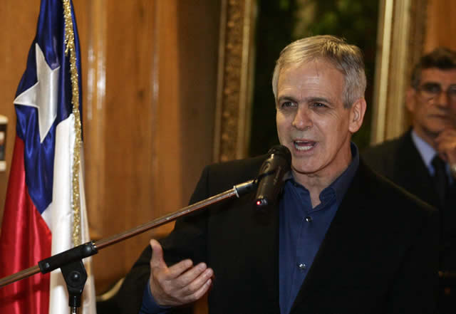 Augusto Góngora